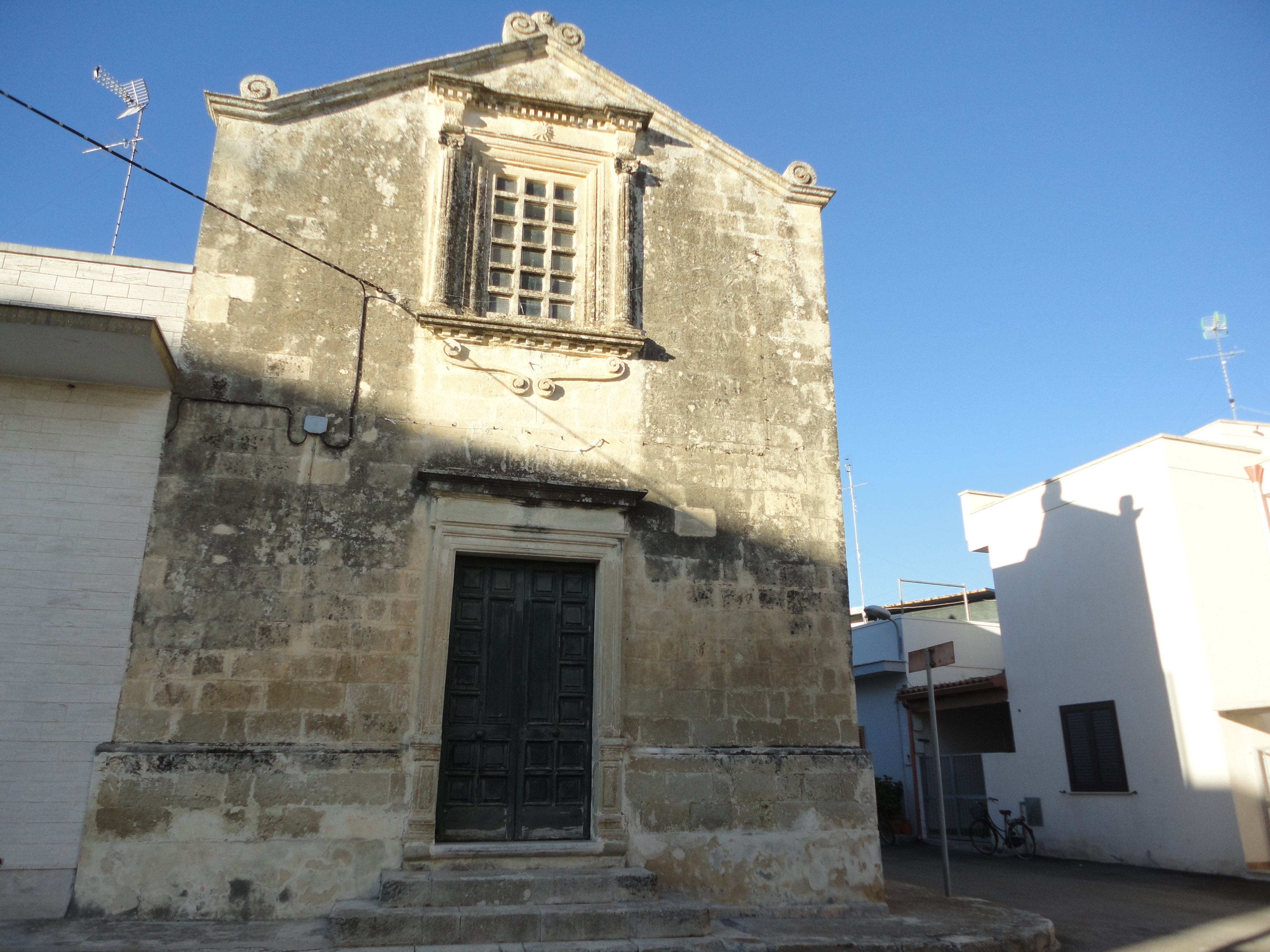 Cappella Madonna delle Grazie Strudà, Lecce